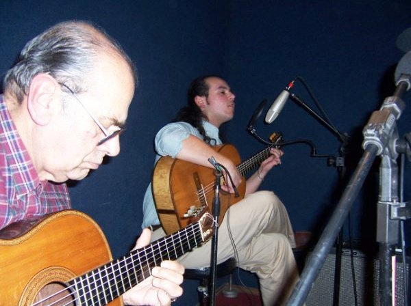 Los músicos uruguayos Hilario Pérez y Fabian Pintos, en la grabación de un disco de la banda "De La Vieja Estirpe".